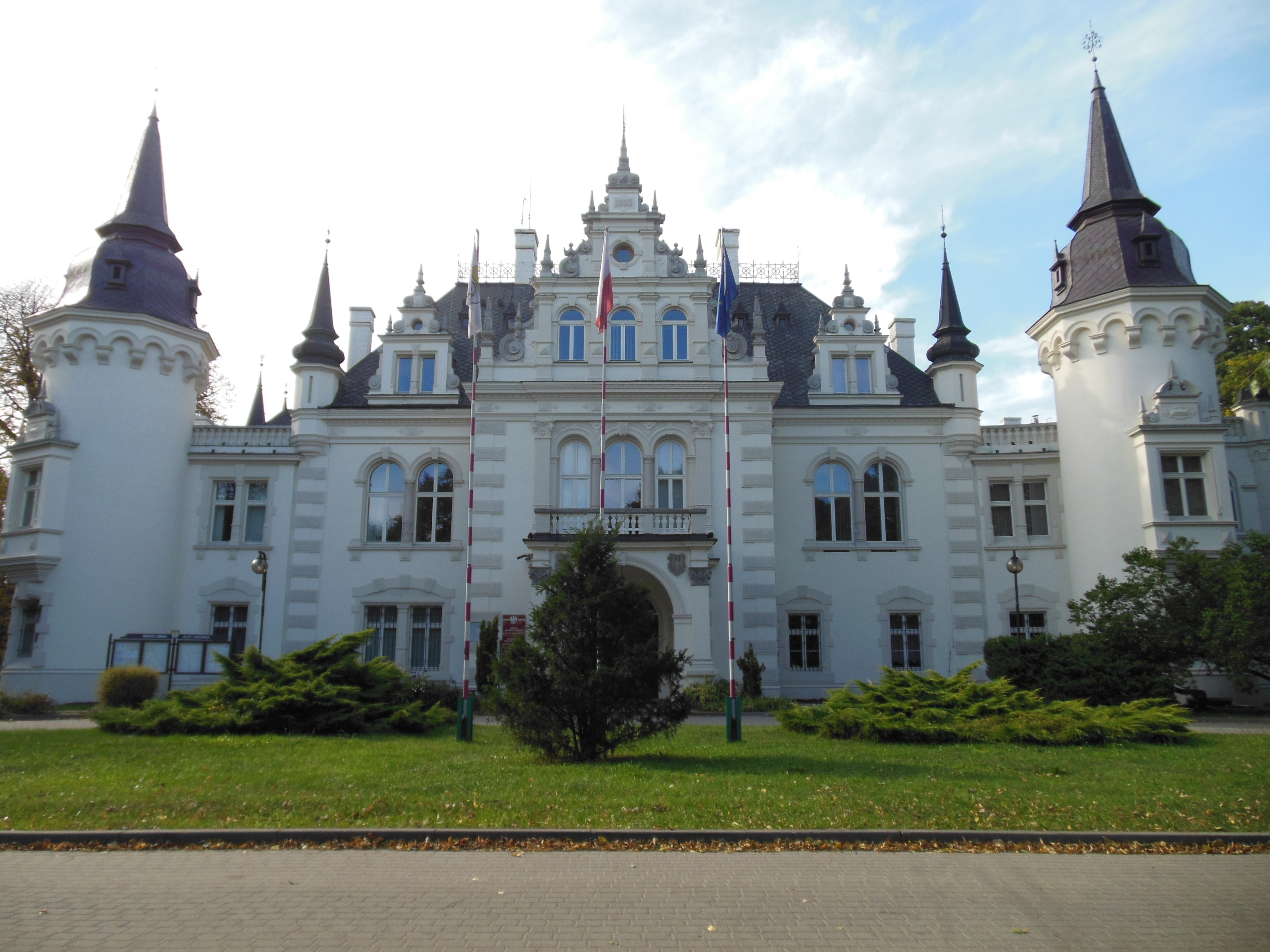 Jelcz-Laskowice, pałac, 1886